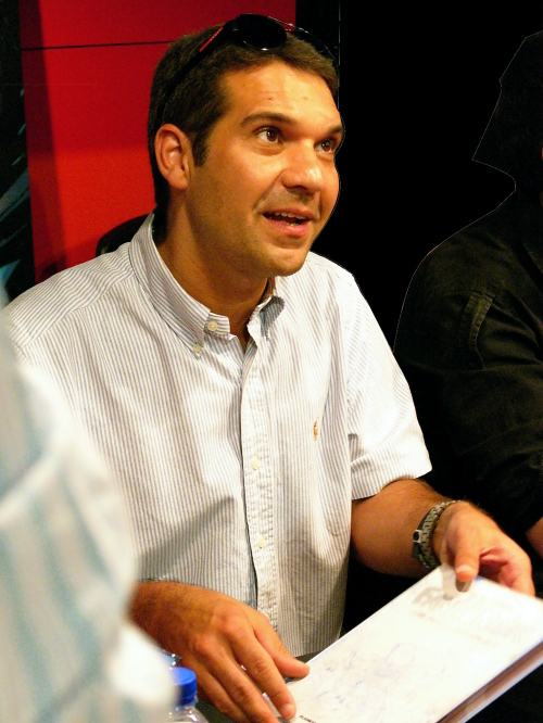 Catalan comics creator Cels Piñol signing at the 27è Saló Internacional del Còmic de Barcelona